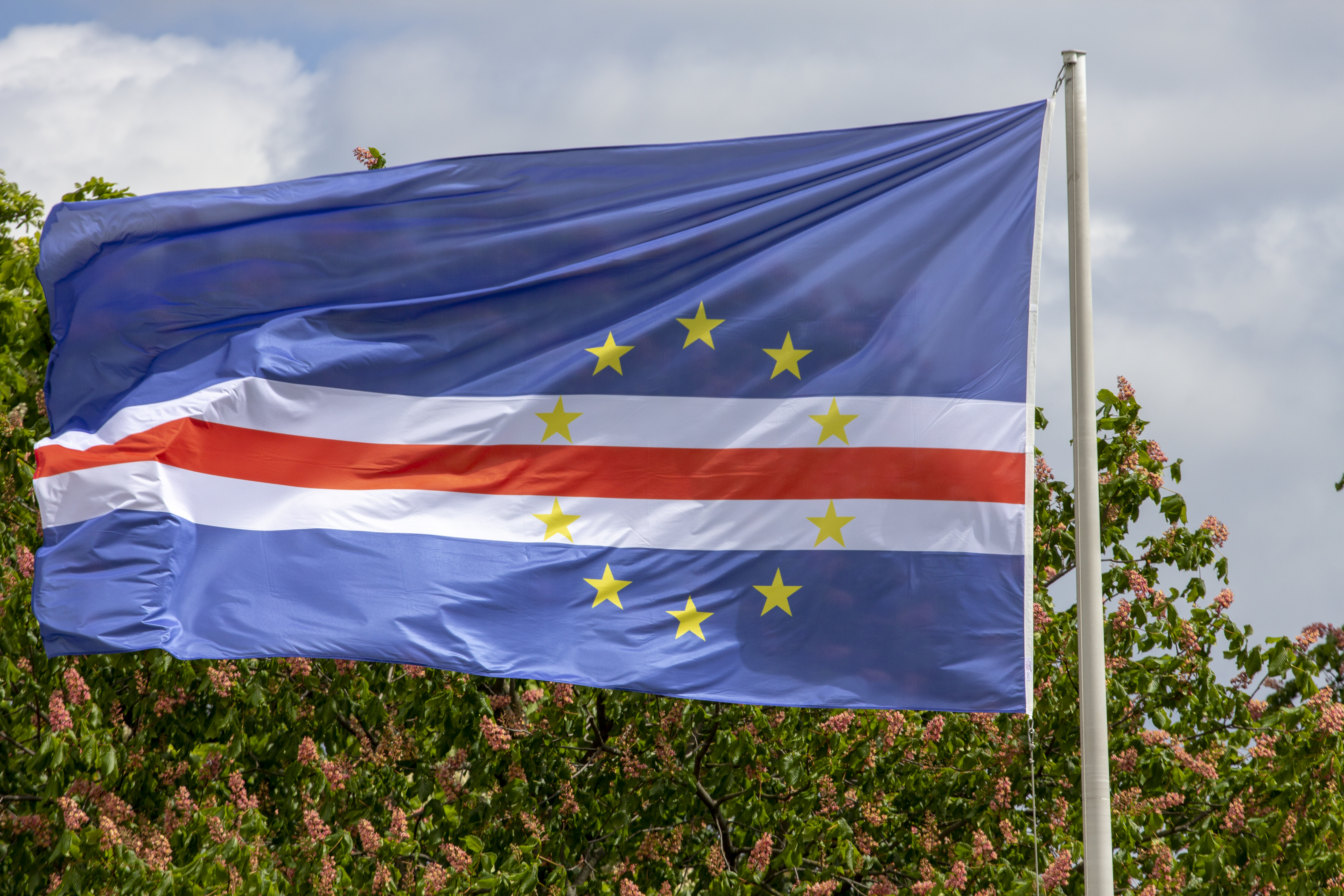 Empfang des Praesidenten der Republik Cabo Verde Jorge Carlos Fonseca bei Bundespraesident Frank-Walter Steinmeier im Schloss Bellevue.